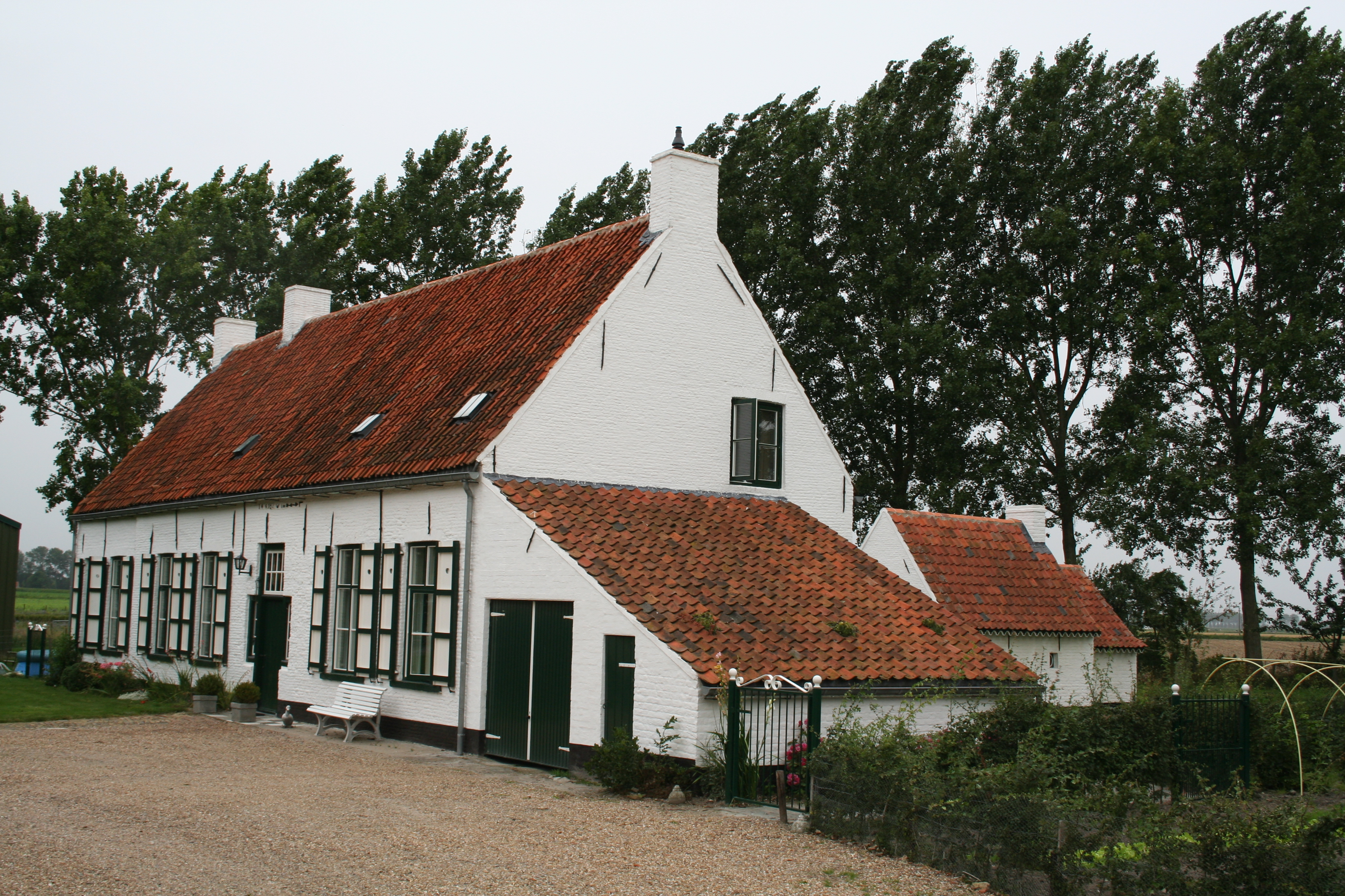 Maneschijnhoeve, gelegen aan de Graaf Jansdijk 7 te Sint Anna ter Muiden